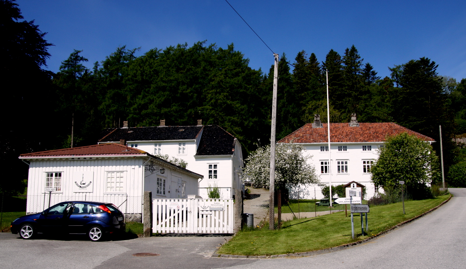 Dalane folkemuseum